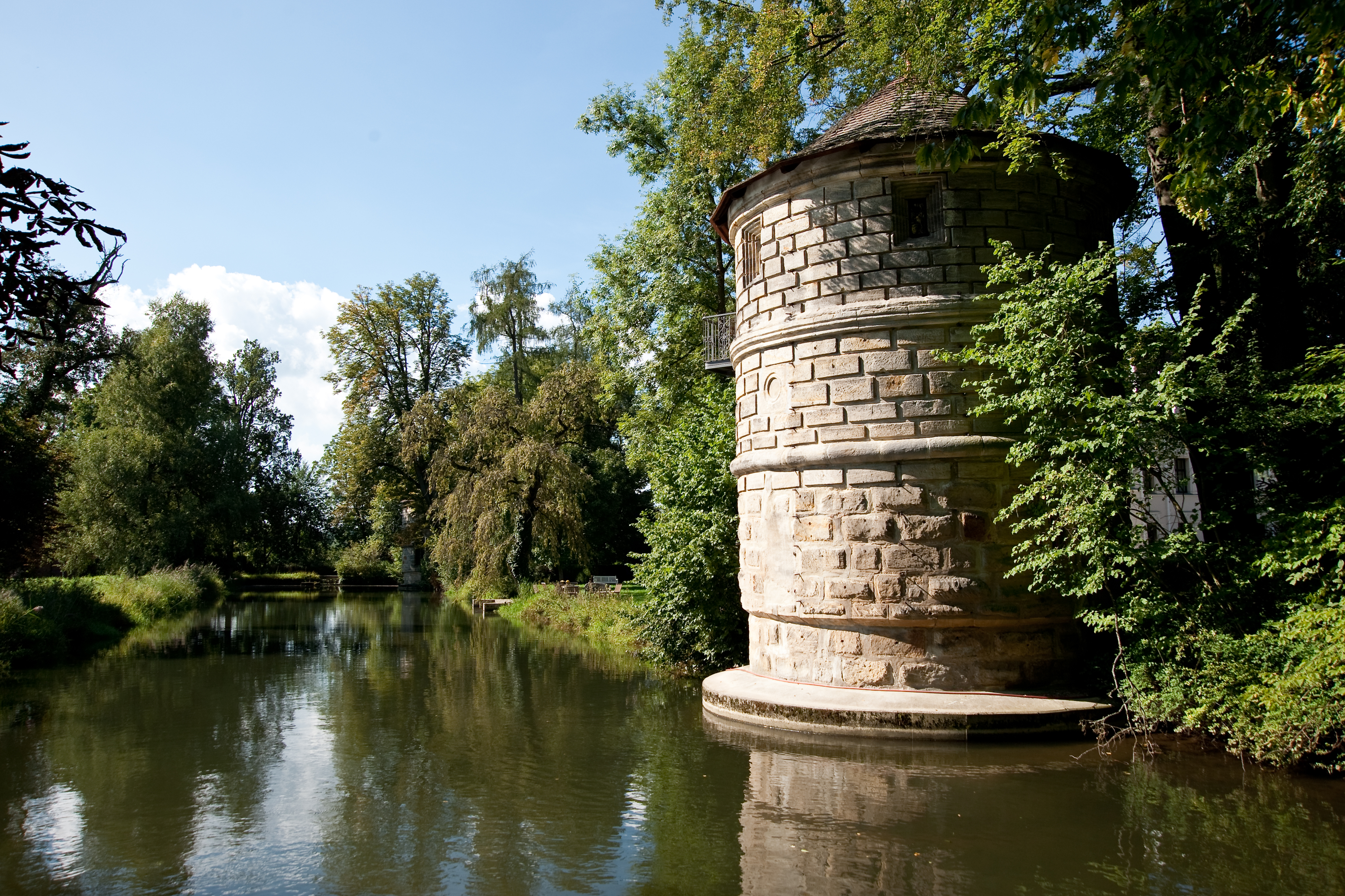 Fluss Pegnitz und die 4 Türme